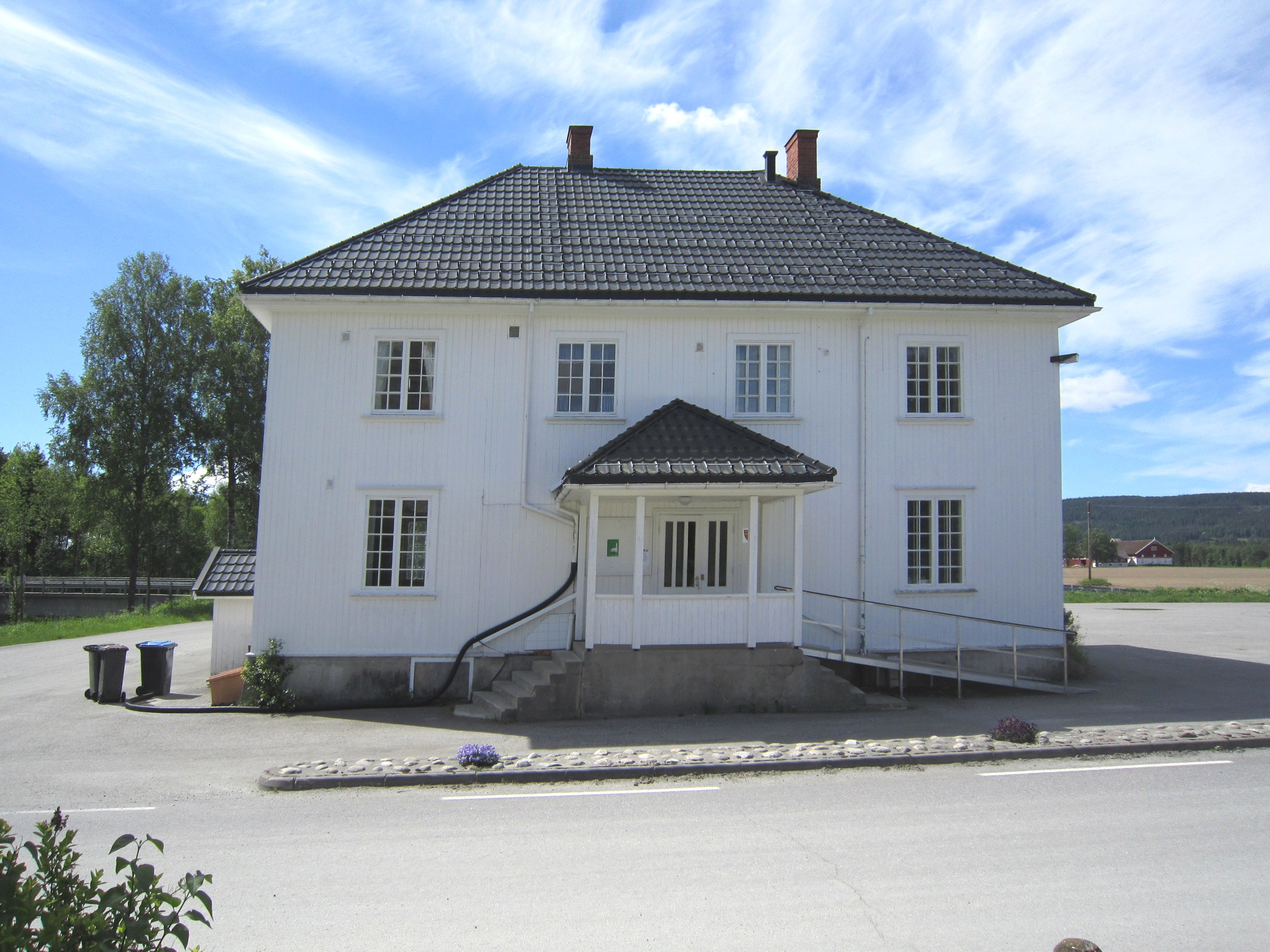 Harald Stormoens veg (fylkesvei 1932, tidl. 265). Det gamle kommunehuset på Mo (nr. 11) er idag tilholdssted for Nord-Odal kirkelige fellesråd.